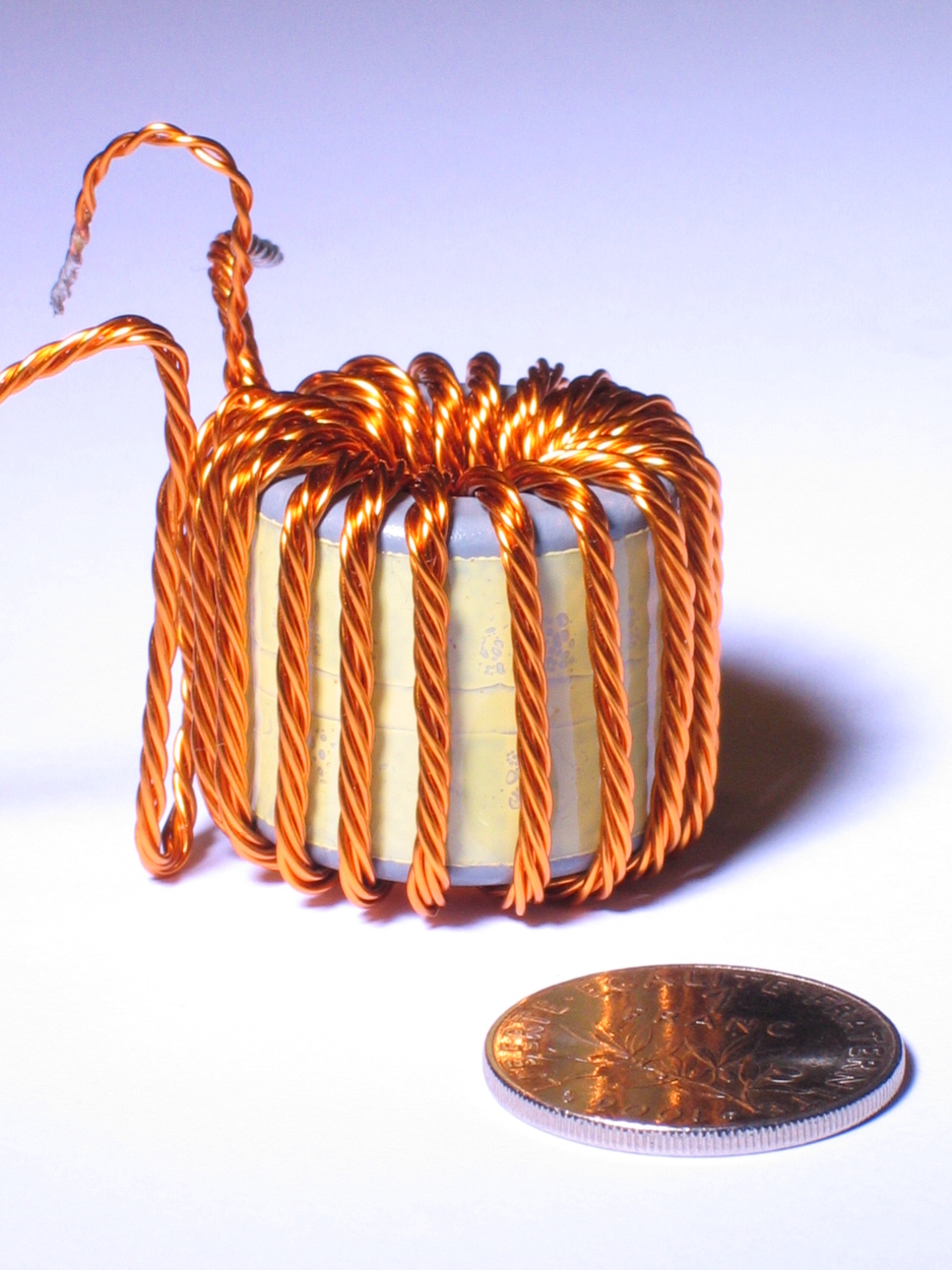 « Transformateur » de convertisseur Flyback 250 W à 50 kHz, dimensions : Ø 28 mm, L 32 mm, masse 90 grammes. Utilisation : étage générateur de puissance constante de ballast pour lampe HMI.